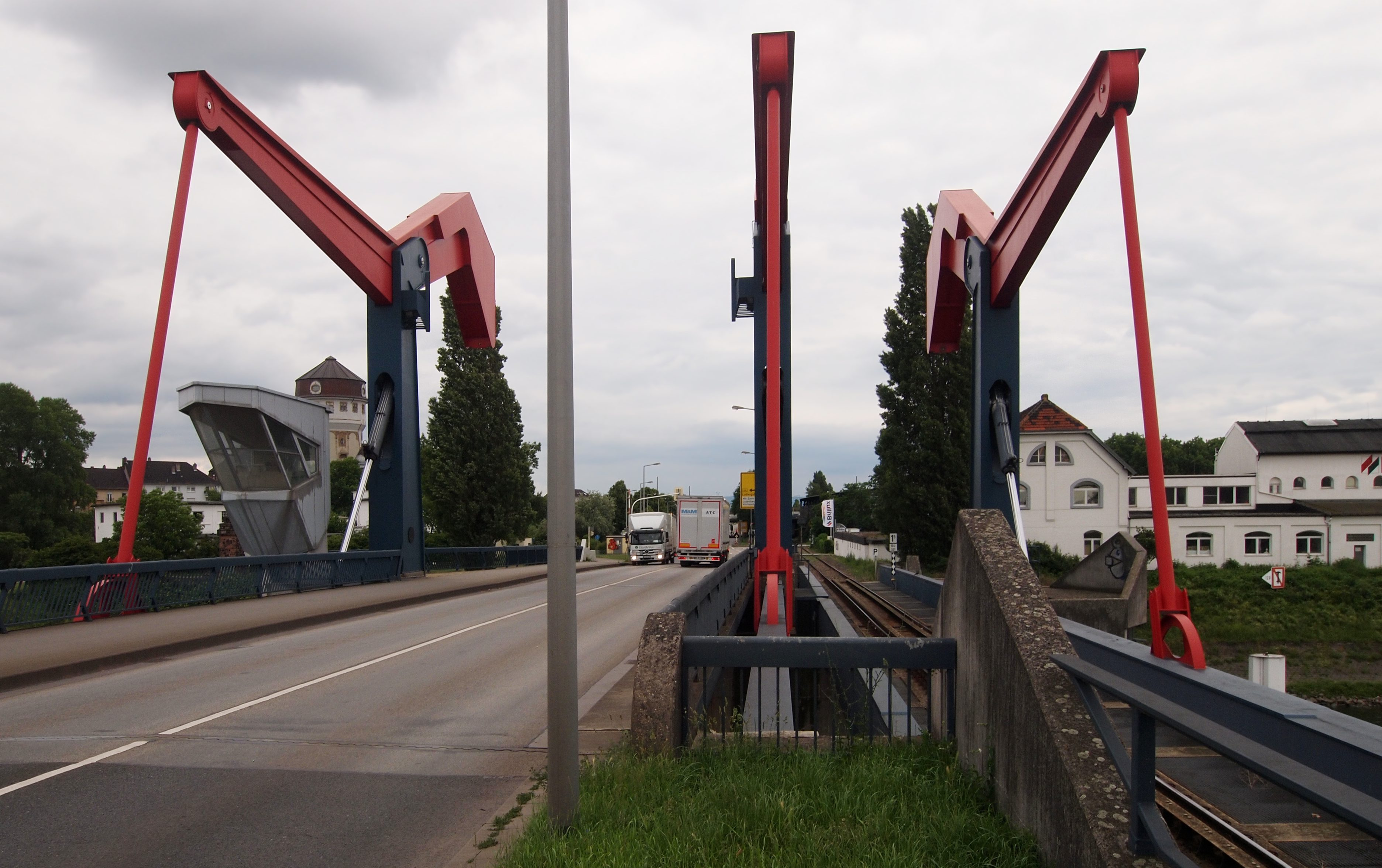 Diffenébrücke